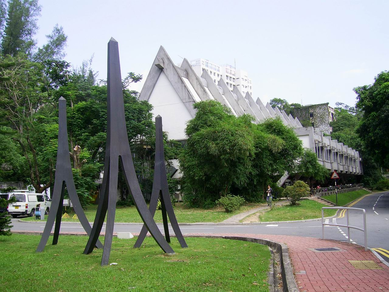 中文（香港）: 「众」字雕塑與眾志堂